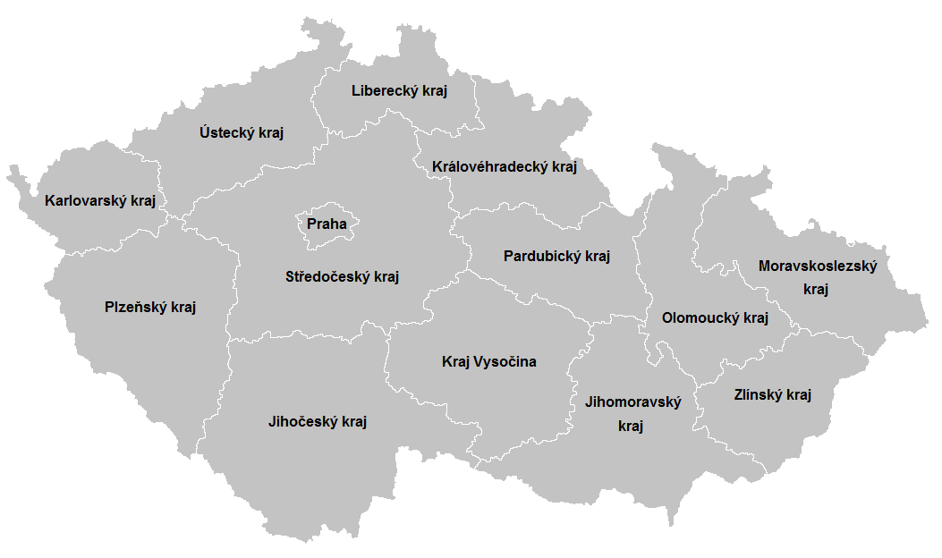 Mapka českých samosprávných krajů (ústavní zákon č. 347/1997 Sb.)